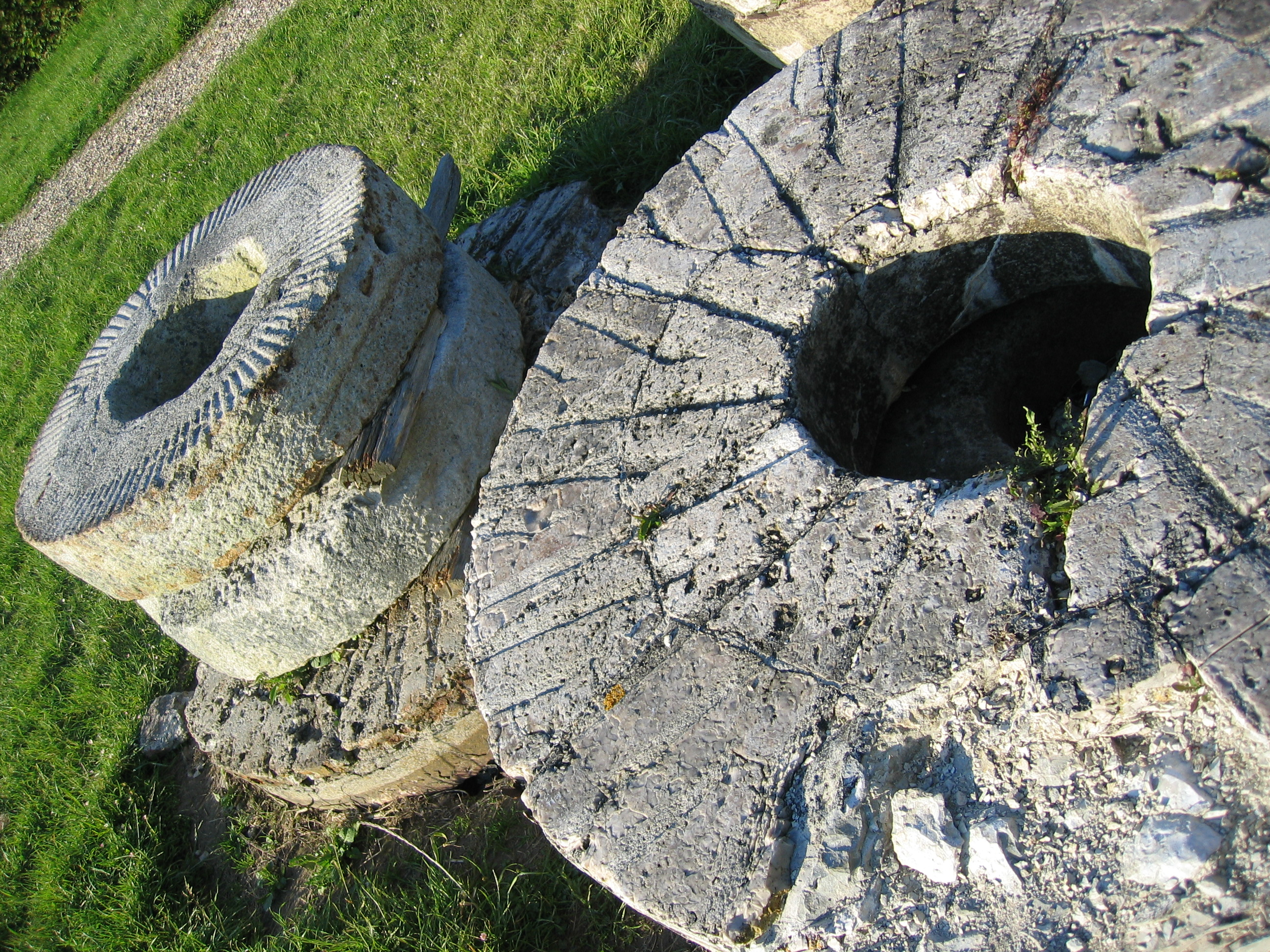 Photo de meules du moulin d'Hauville (27), prise en juin 2005. Sawyer